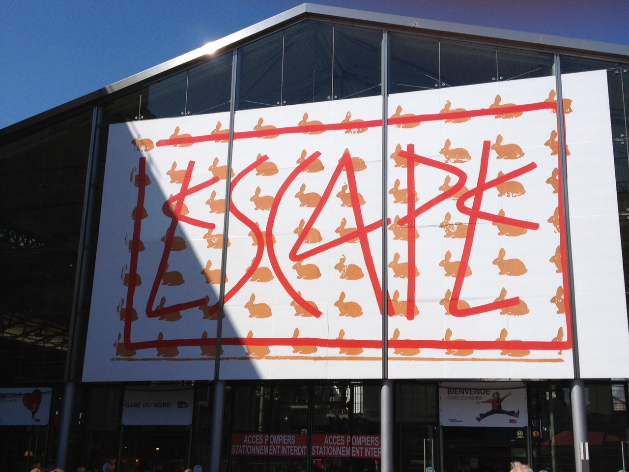 Photo de l'oeuvre "Escape" de l'artiste SP 38 prise à l'entrée de la Gare du Nord en juin 2015.